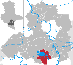 Braunsbedra in Saxony-Anhalt - Saalekreis